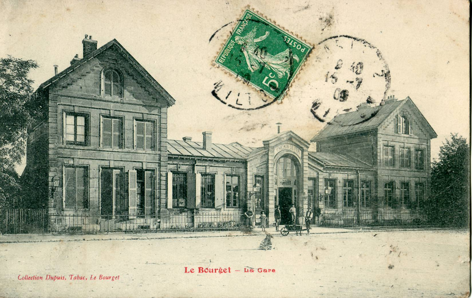 La gare du Bourget (réseau du Nord), au début du XXe siècle